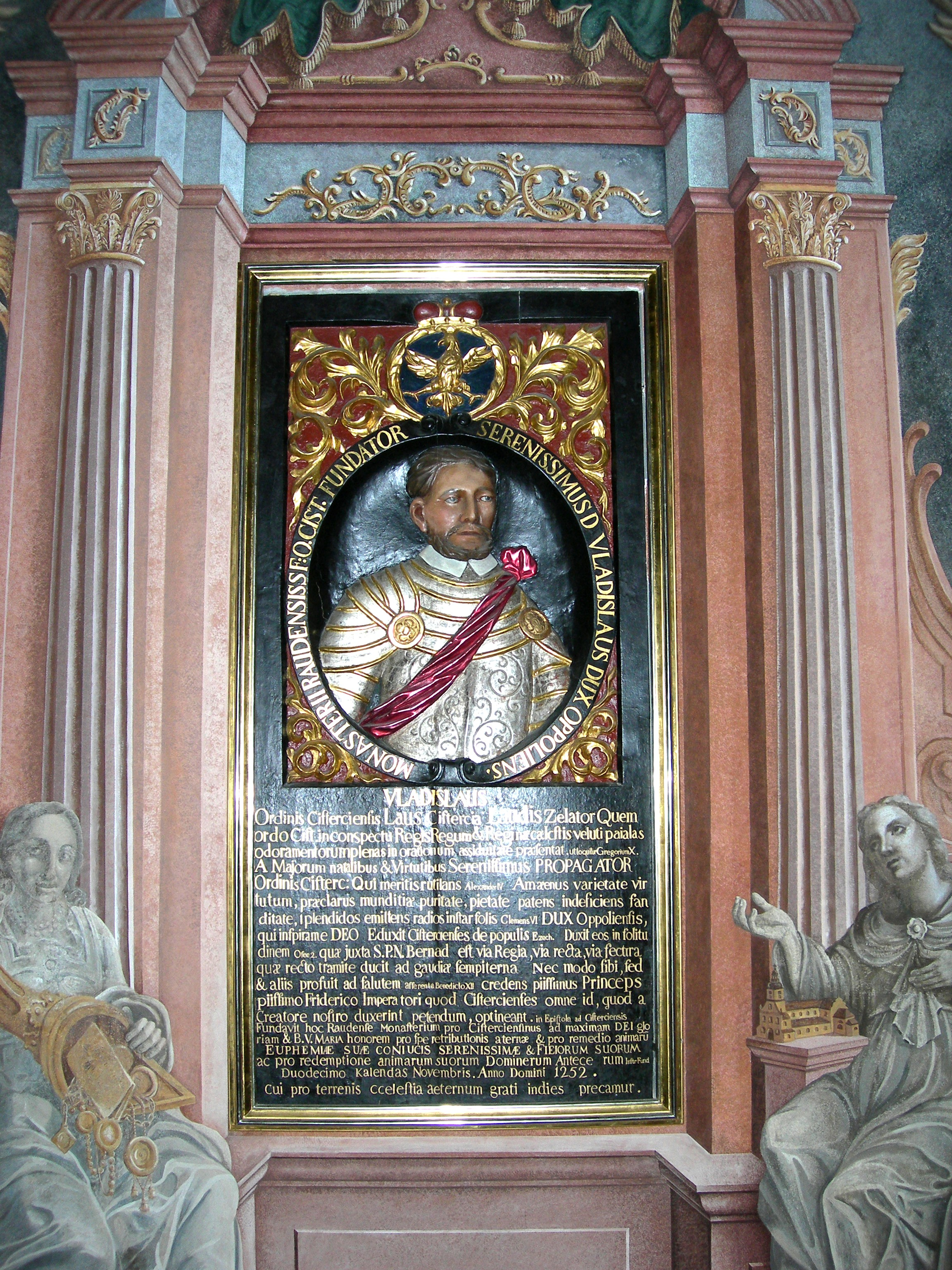 Epitafium księcia Władysława Opolskiego w kościele klasztornym w Rudach Wielkich (Raciborskich). 2006